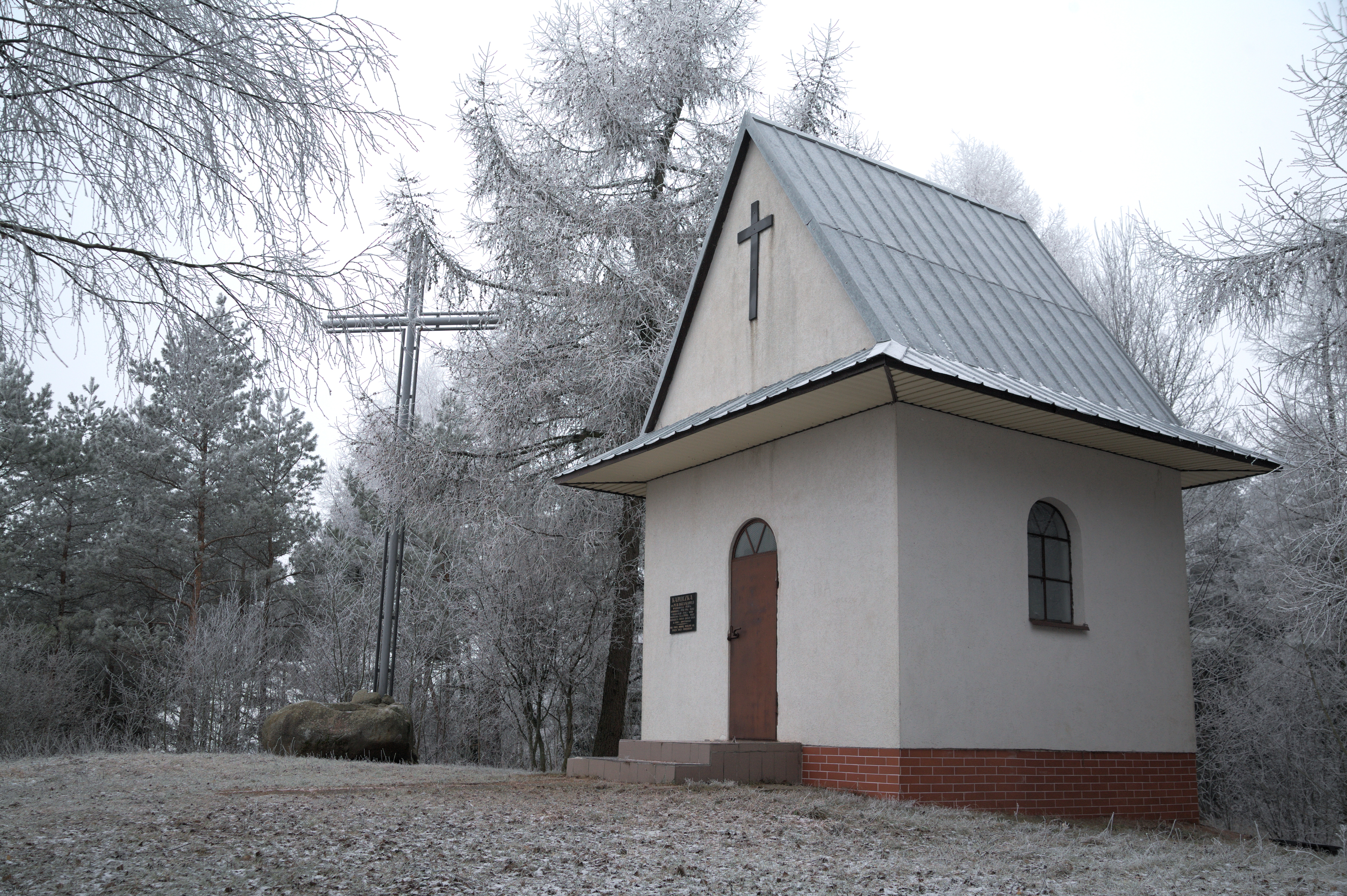 Kaplica na górze Krzemieniucha w Żywej Wodzie